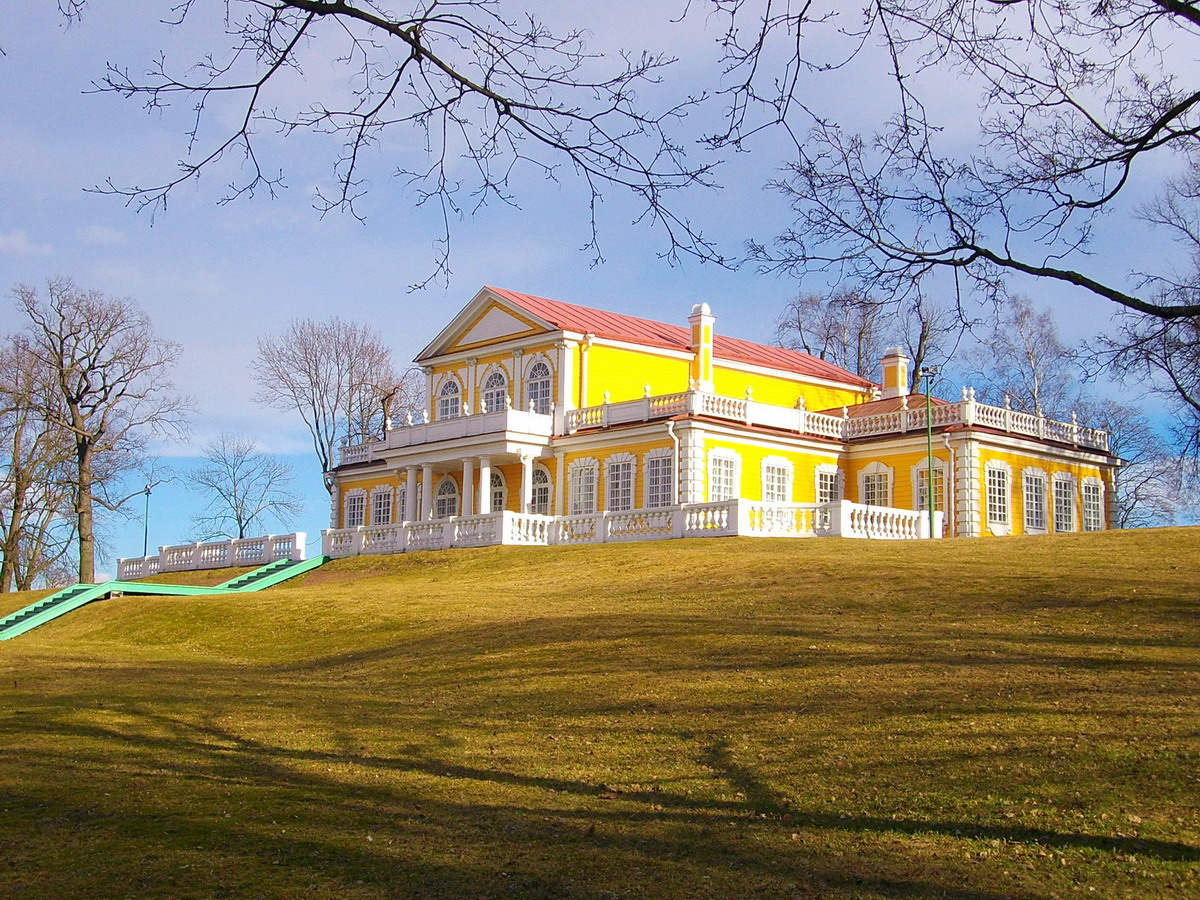 Дворец Петра I: Больничная горка, 2, Стрельна, Петродворцовый район, Санкт-Петербург